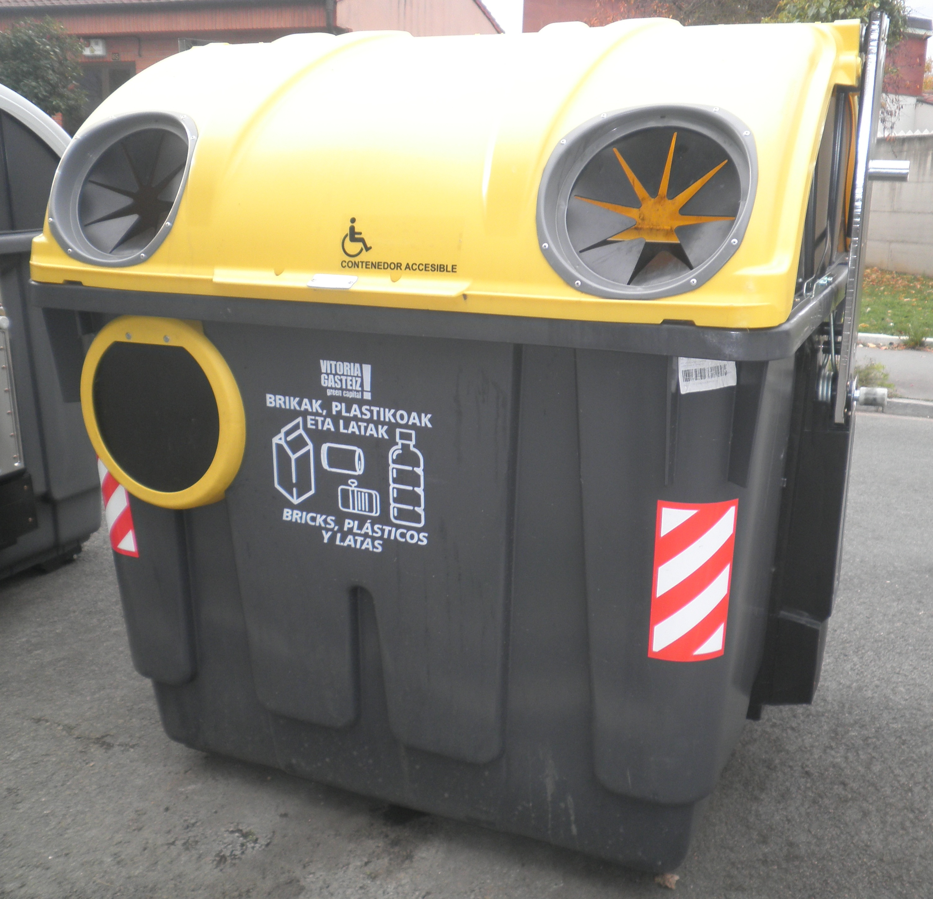 Contenur Gasteiz